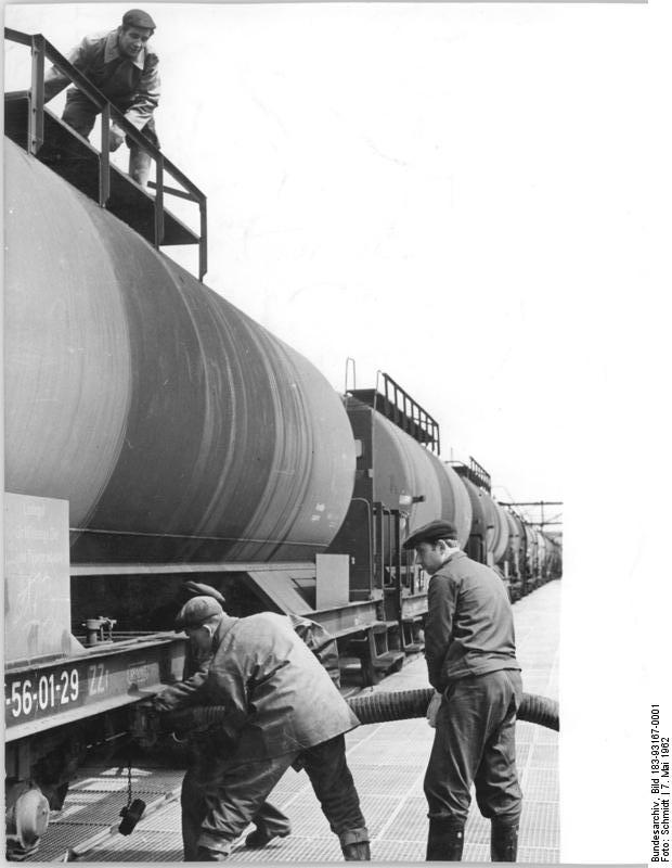 Zentralbild-Schmidt 7.5.1962 Erster sowjeitscher Erdölzug in Lützkendorf. Die mit einem Kostenaufwand von 90 Millionen DM errichtete erste Ausbaustufe ihrer neuen Destillationsanlage im VEB Mineralölwerk Lützkendorf wurde kürzlich in Betrieb genommen. Arbeiter von der Vorladeeinrichtung schließen die Leitungen an den ersten im Werk eingetroffenen sowjetischen Erdölzug an.